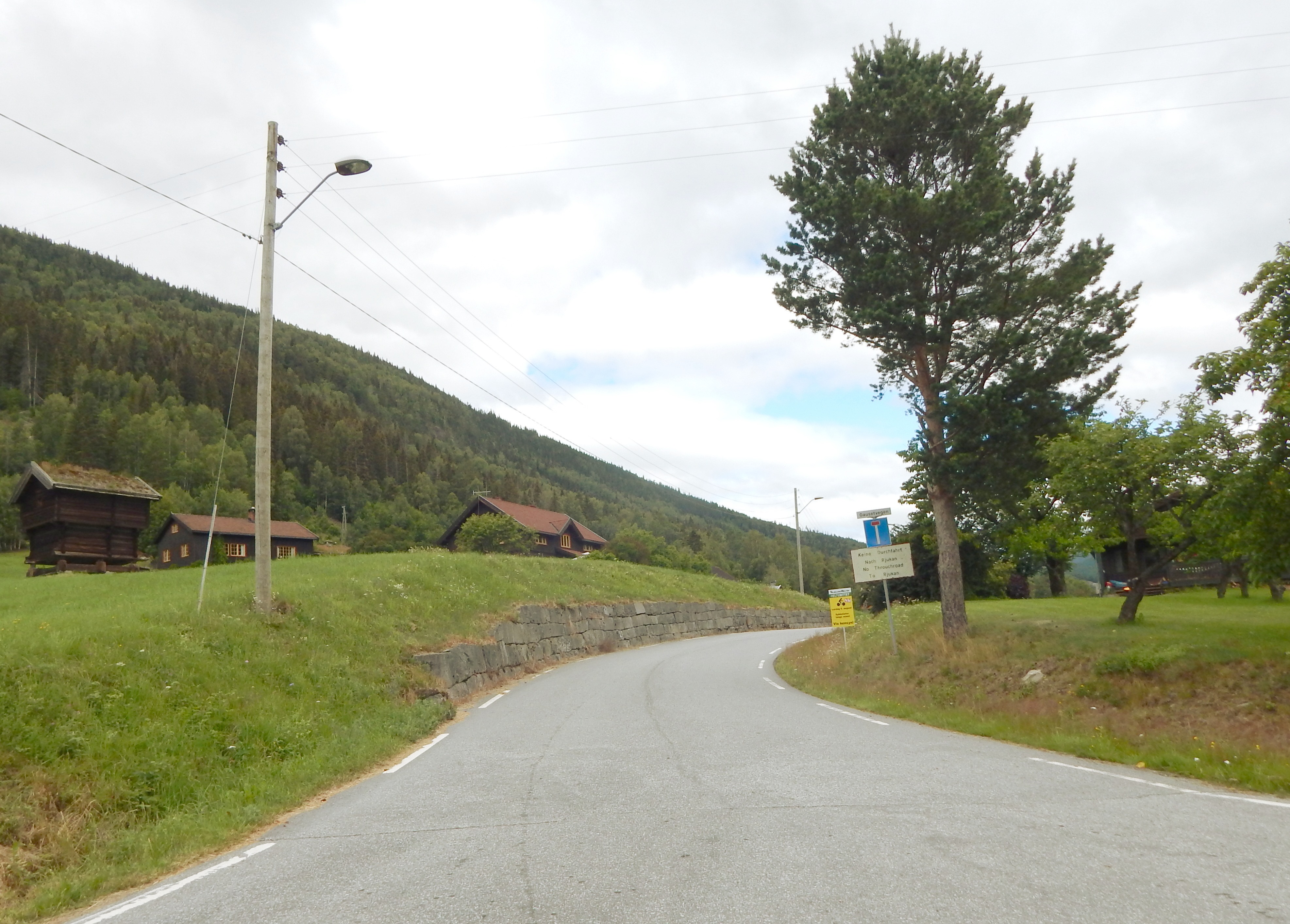 Gausetvegen (fylkesvei 756) går nordover fra primær fylkesvei 364 og langs elven Mår.